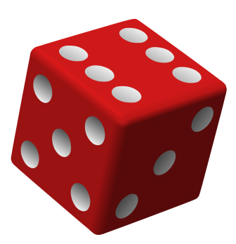 6-seitiger roter Würfel mit weißen Augen.